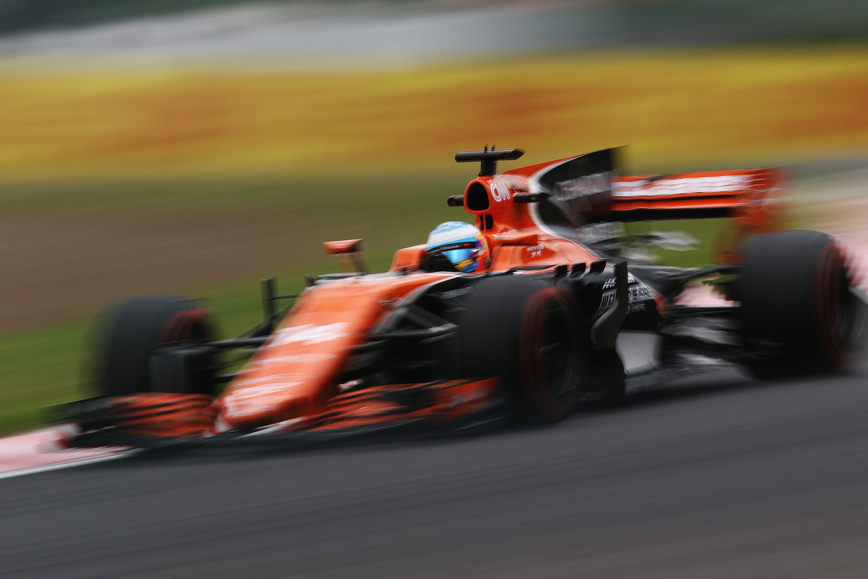 2017.10.6 F1 Rd.16 Japanese GP SUZUKA (FP1) McLaren Honda F1 Team (MCL32) 2 フェルナンド・アロンソ [7D2_0955ks]